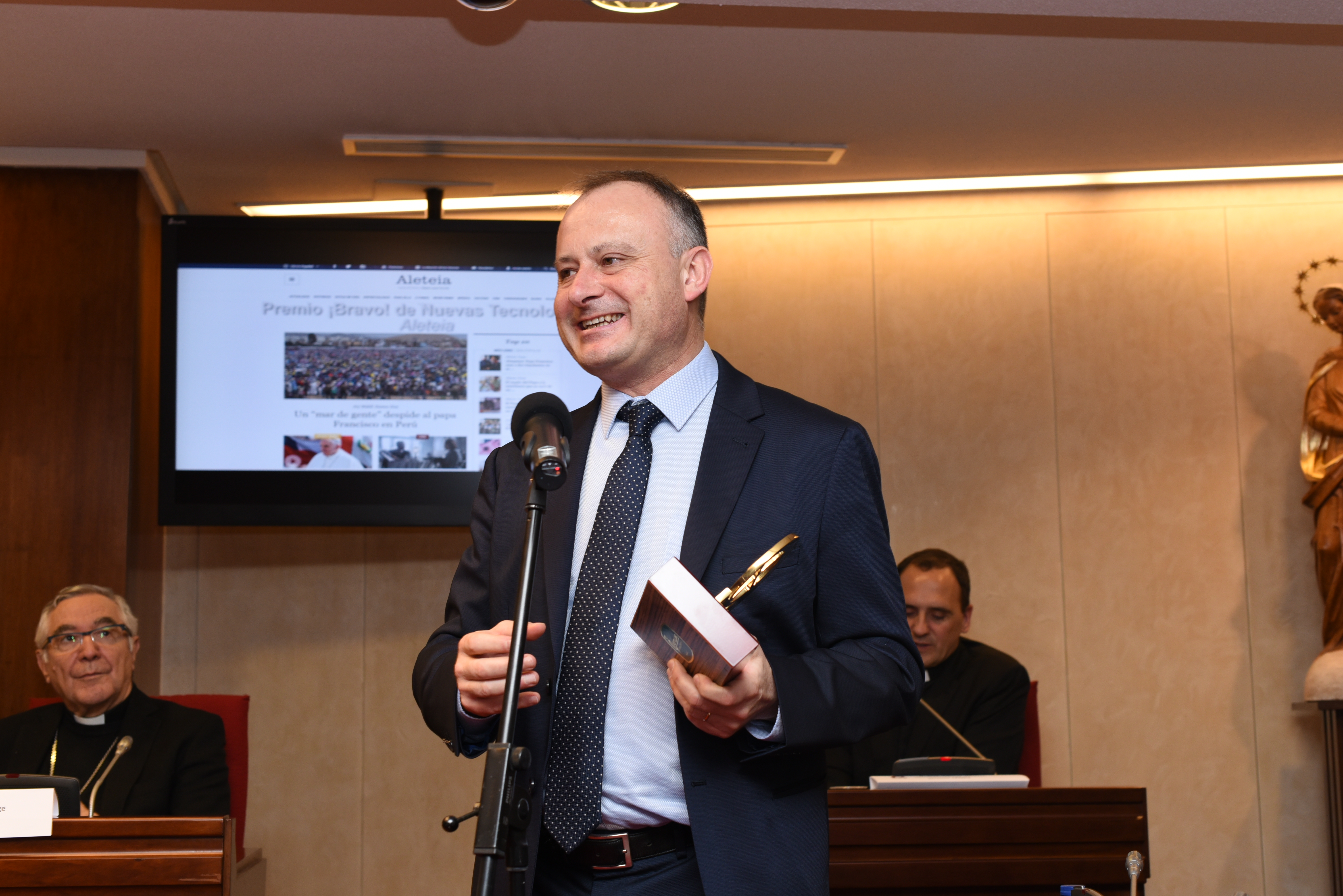 Jesús Colina, periodista de Aleteia.